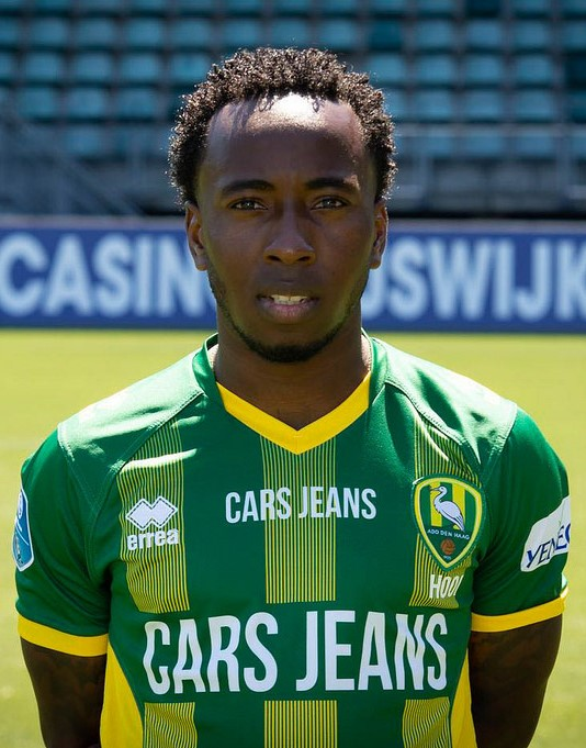 Elson Hooi